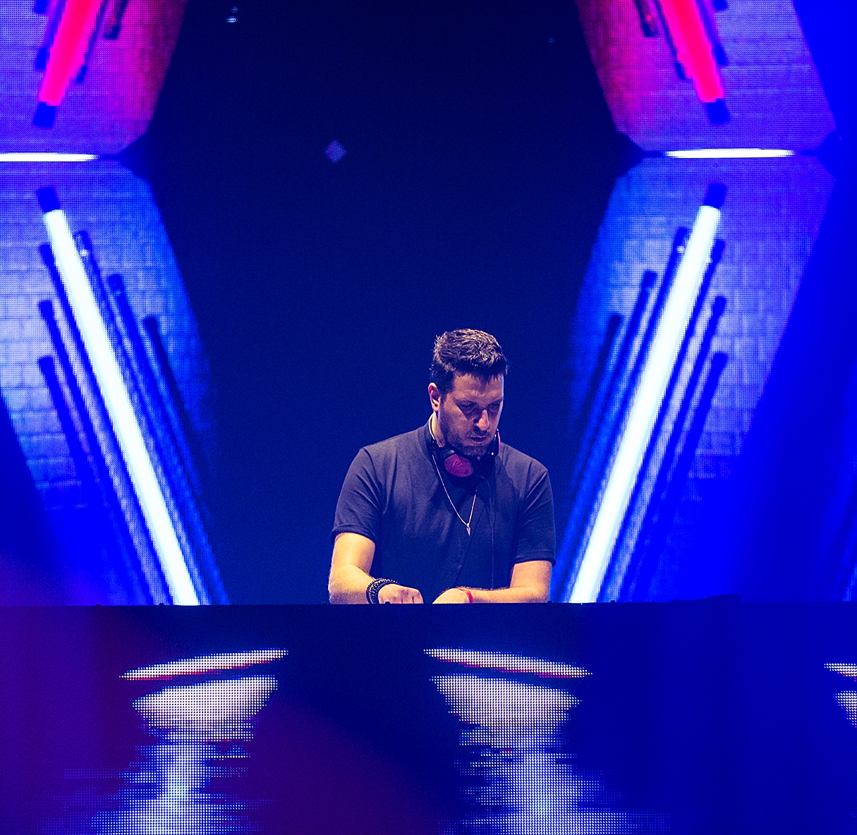 דור דקל מחמם את טייסטו בגני התערוכה 2019